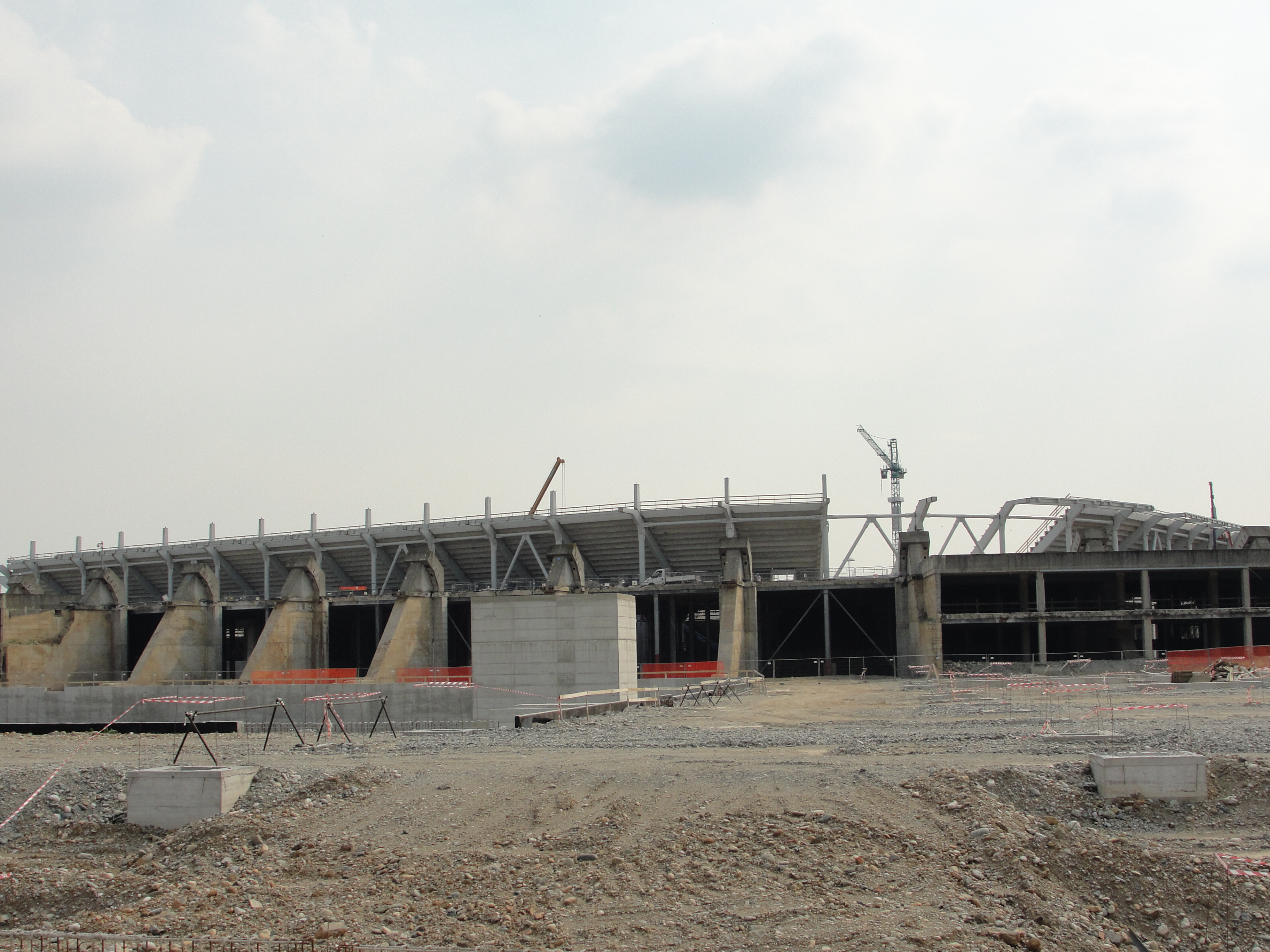 Le nouveau stade en construction de la Juventus, Turin - au 1er plan, les piliers de l'ancien Stadio delle Alpi (juin 2010).